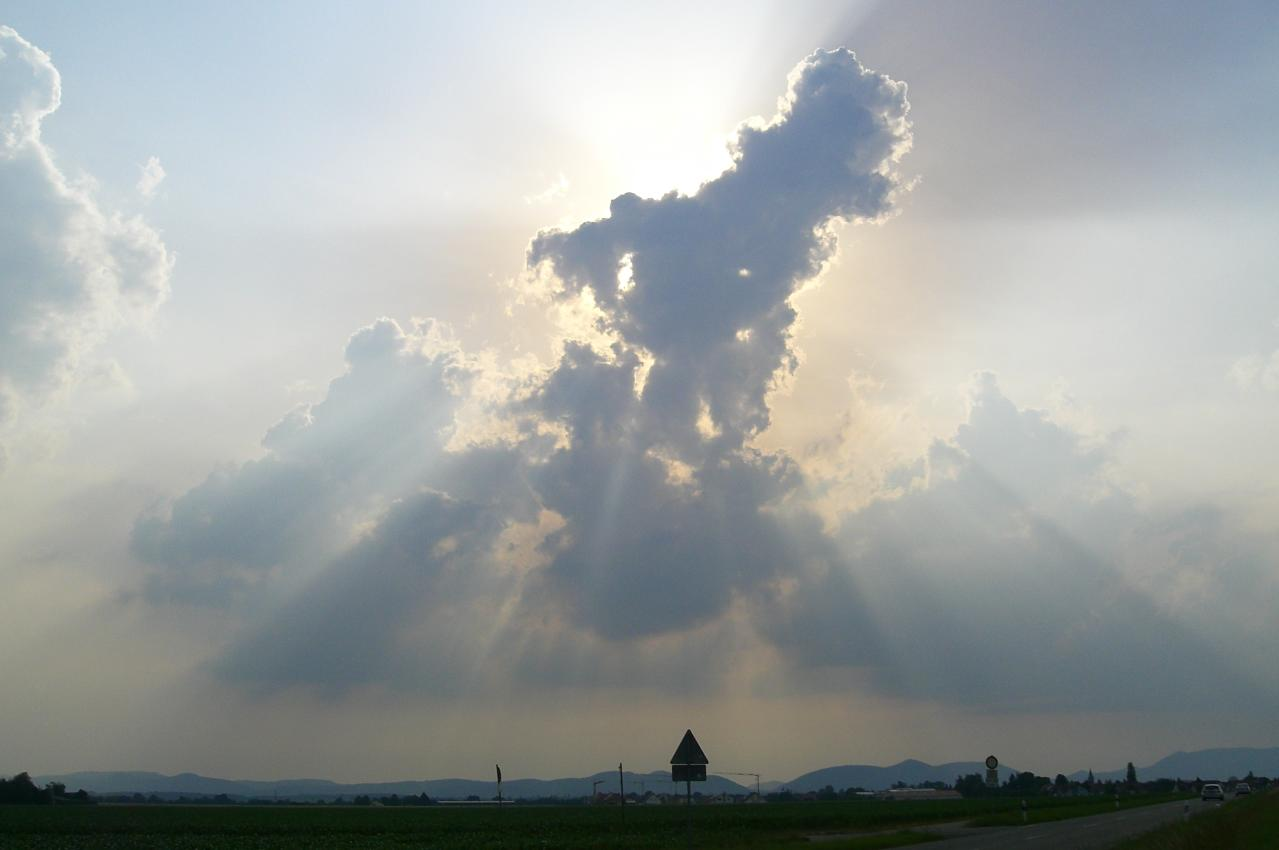 Cumulus congestus über den Feldern der Südpfalz Aufgenommen am 15. Juni 2006 zwischen Kandel und Steinweiler von Sebastian Geißert, Kandel